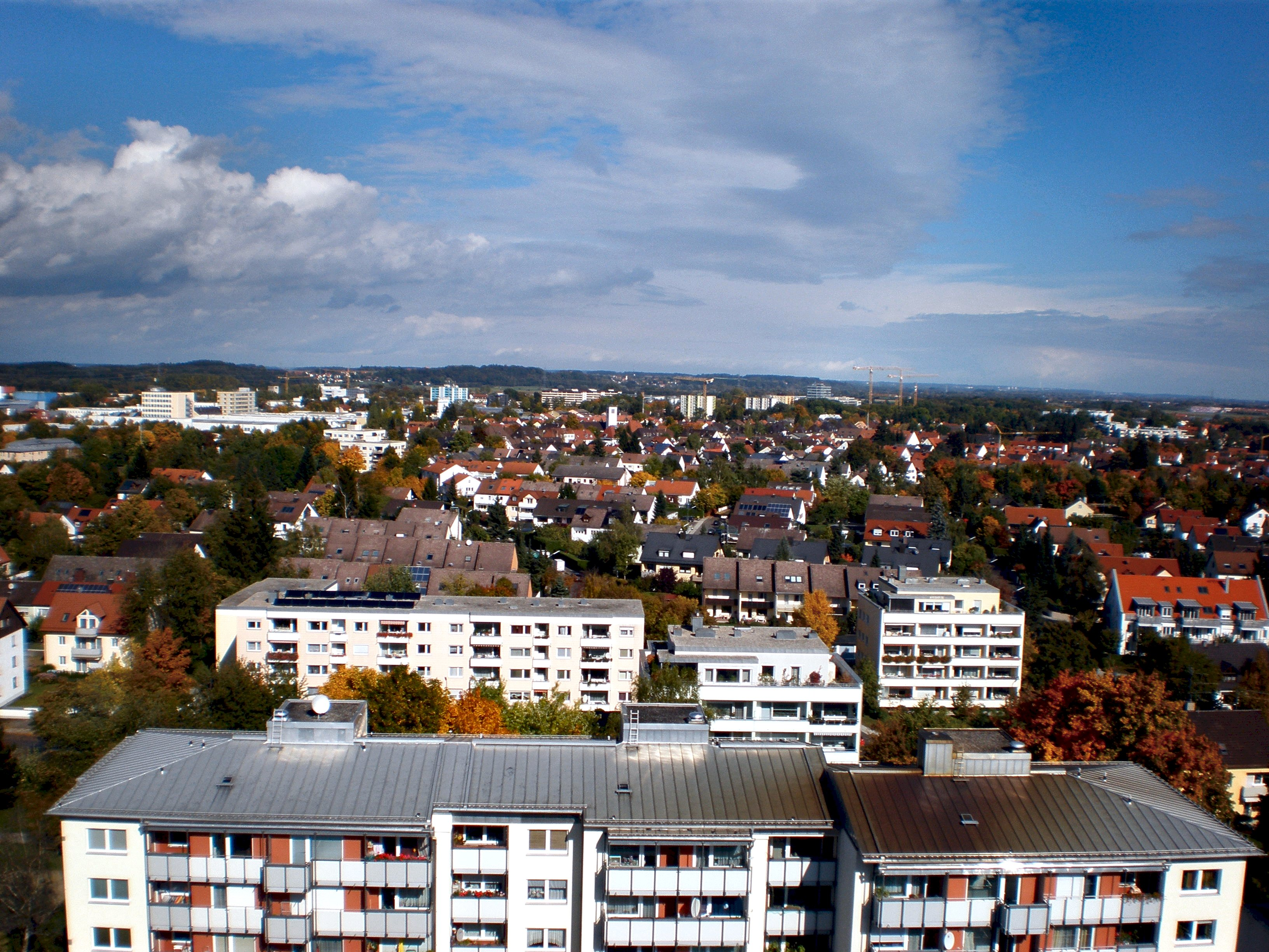 Unterschleißheim 15.10.2013